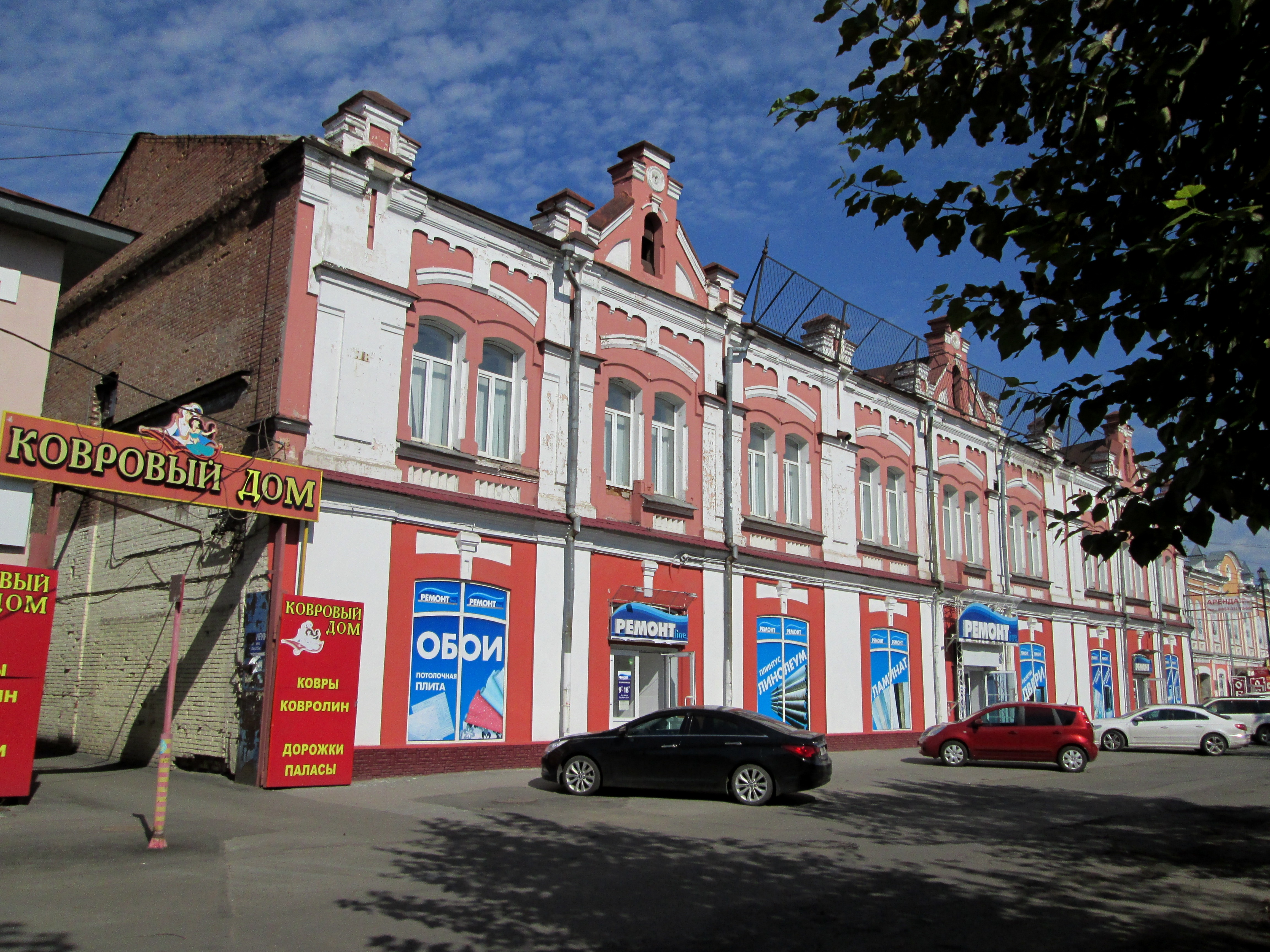 Здание магазина Второва: улица Льва Толстого, 32, Барнаул, Алтайский край